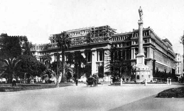 Vista del Palacio de Justicia de la República Argentina, frente a la Plaza Lavalle en Buenos Aires. Se ve al edificio aún en construcción, alrededor del año 1910.